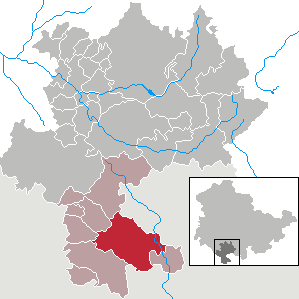 Bad Colberg-Heldburg in Thuringia - district Hildburghausen